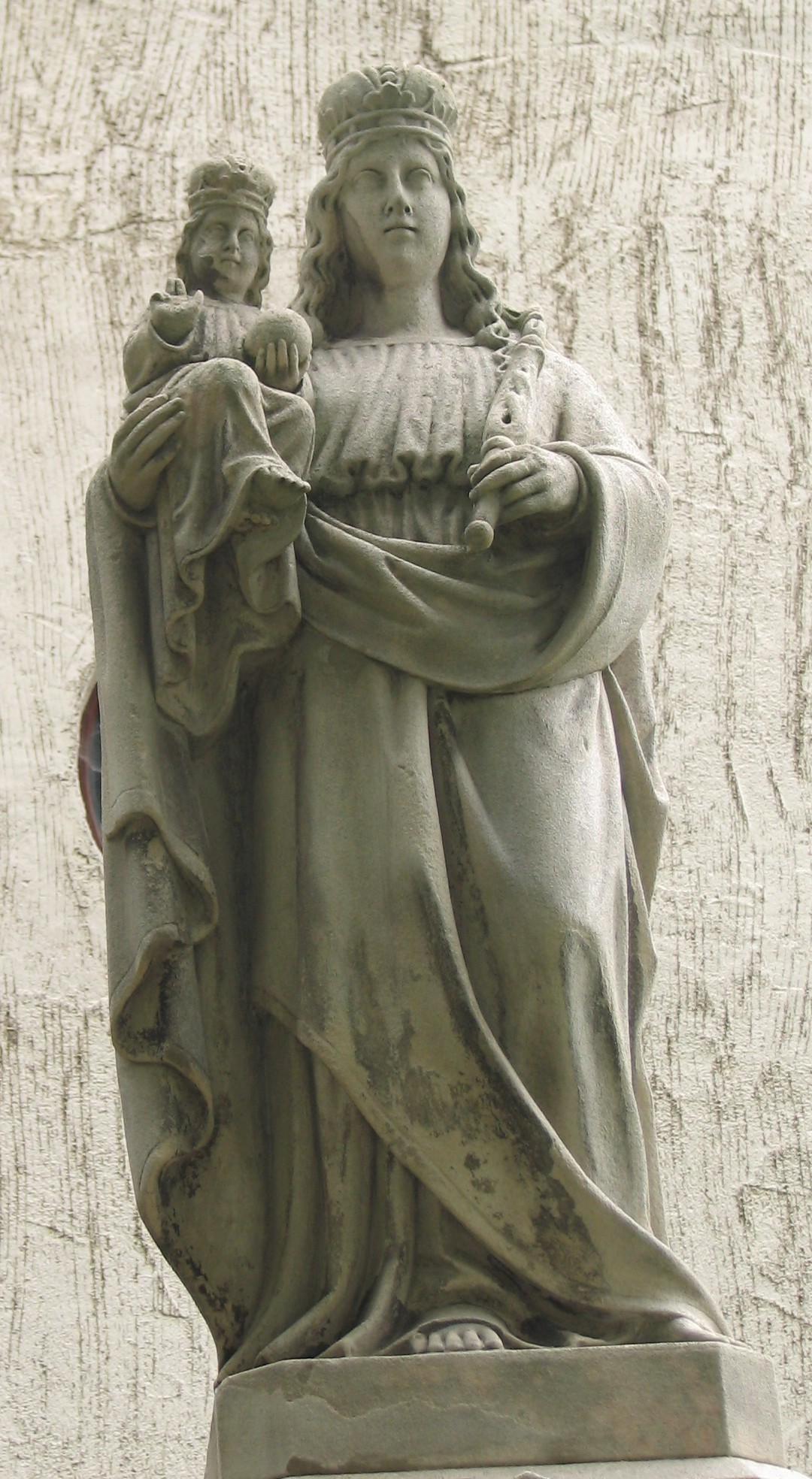 Szűz Mária szobra (Kisszőlős, Veszprém megye) Felirata: „Óh, Szűz Mária! Magyarország patronája. Tengeren evezők reménycsillaga Könyörögj érettünk. Felállították Amerikában dolgozó szeretteink. (Kondor, Kis Czell) 1906.